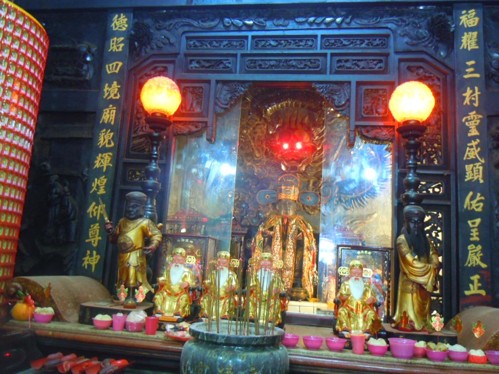 中文(繁體):白沙坑文德宮的所在地:彰化縣花壇鄉彰員路。